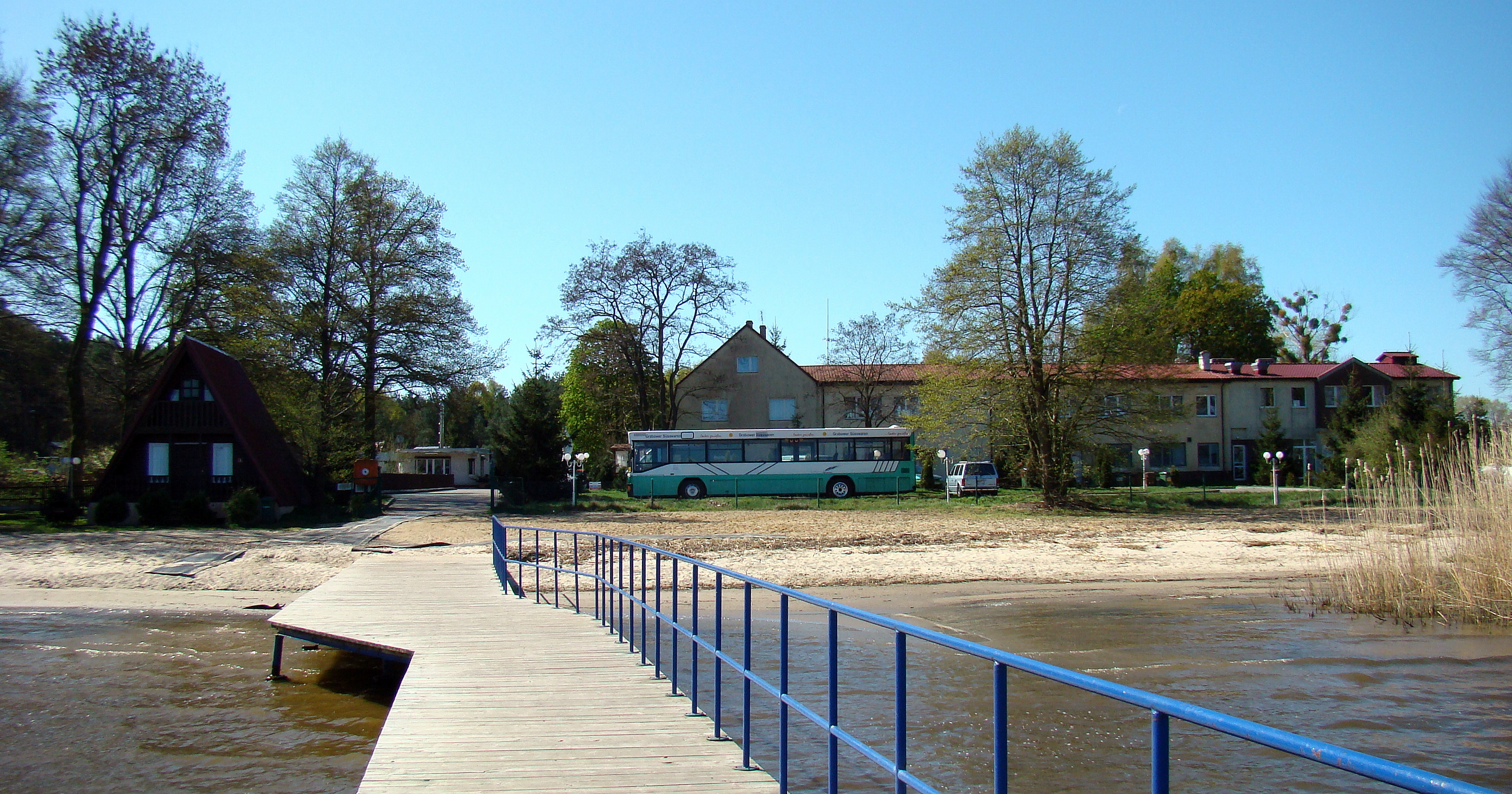 Popielewo, plaża a w głębi ośrodek wypoczynkowo-szkoleniowy "Brzózki" (Gmina Nowe Warpno, Województwo zachodniopomorskie), Polska